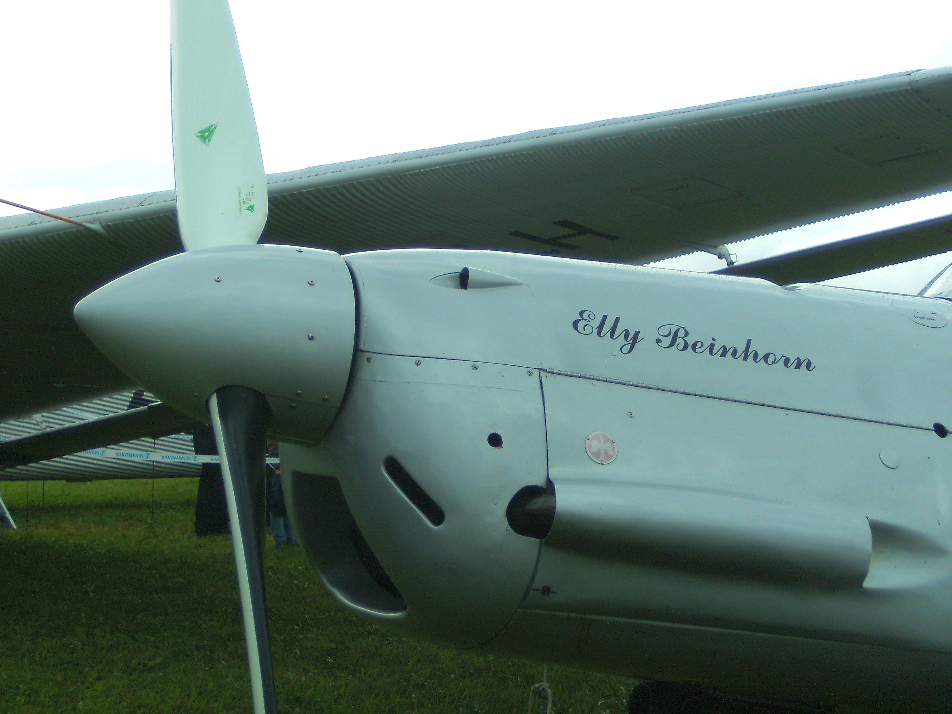 Tannkosh 2009